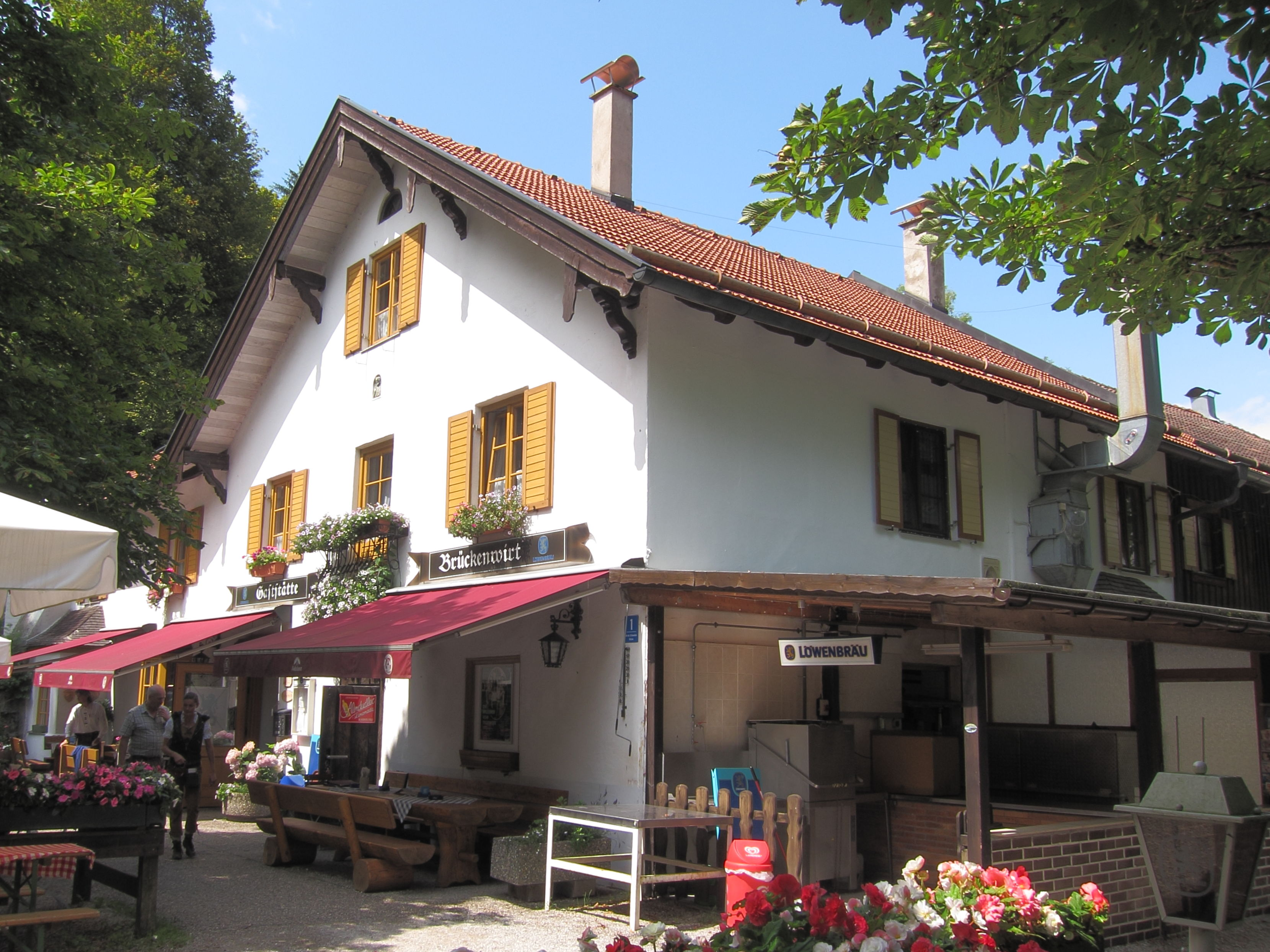 Brückenwirt, ehem. Gutshaus und Herberge, jetzt Ausflugsgasthaus, zweigeschossiger Satteldachbau im Stil eines oberbayerischen Einfirsthofes, von Franz Höllriegel, 1848.